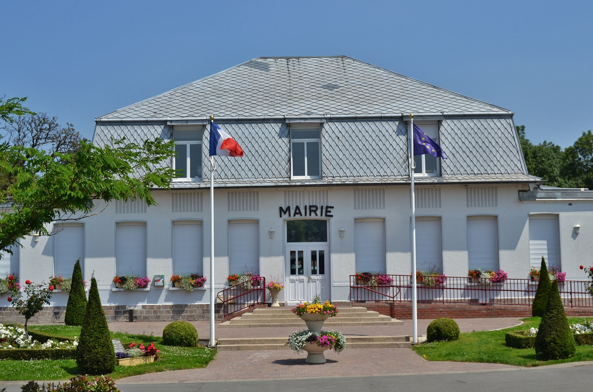 La Mairie